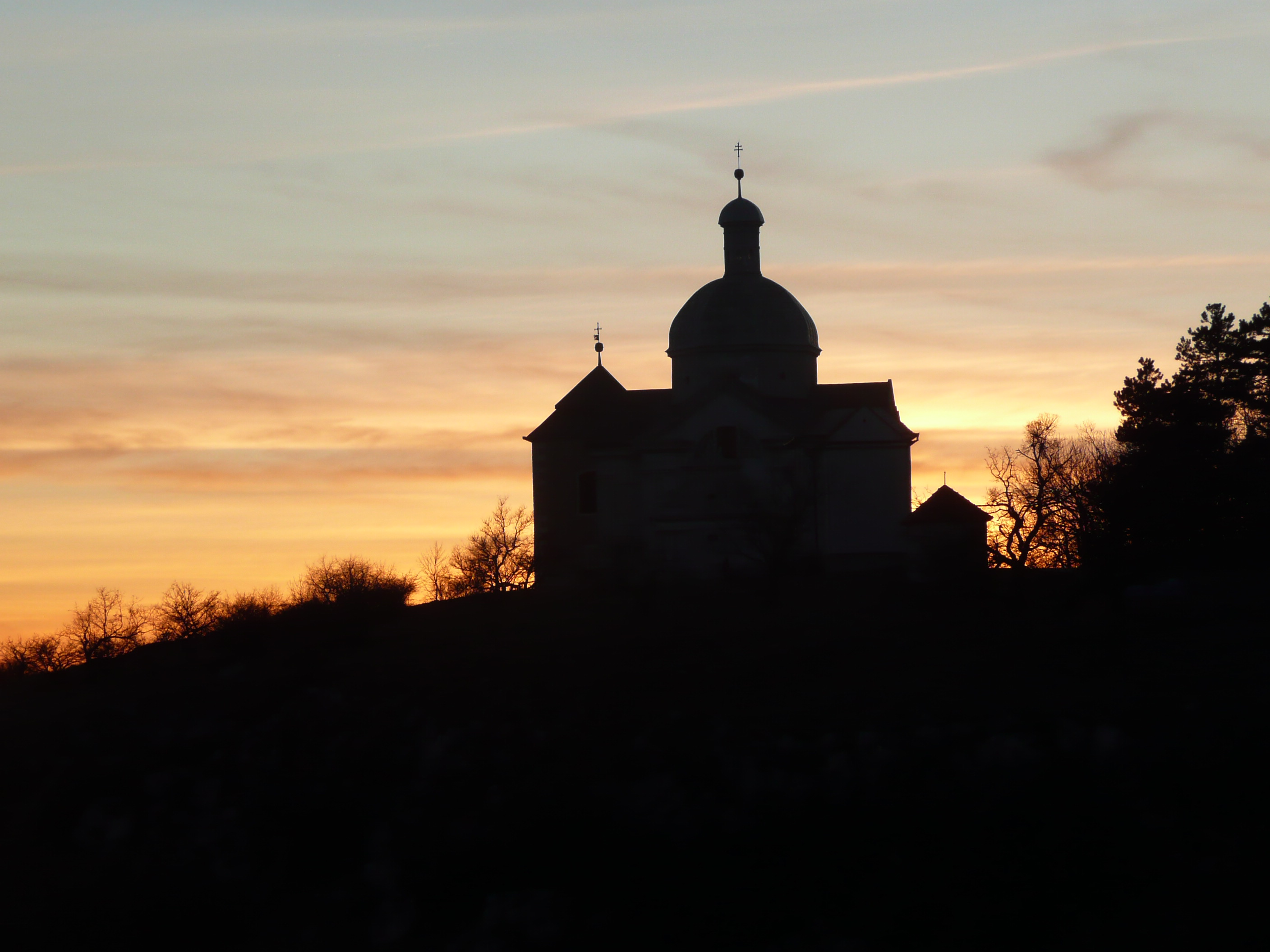 Zapadající slunce